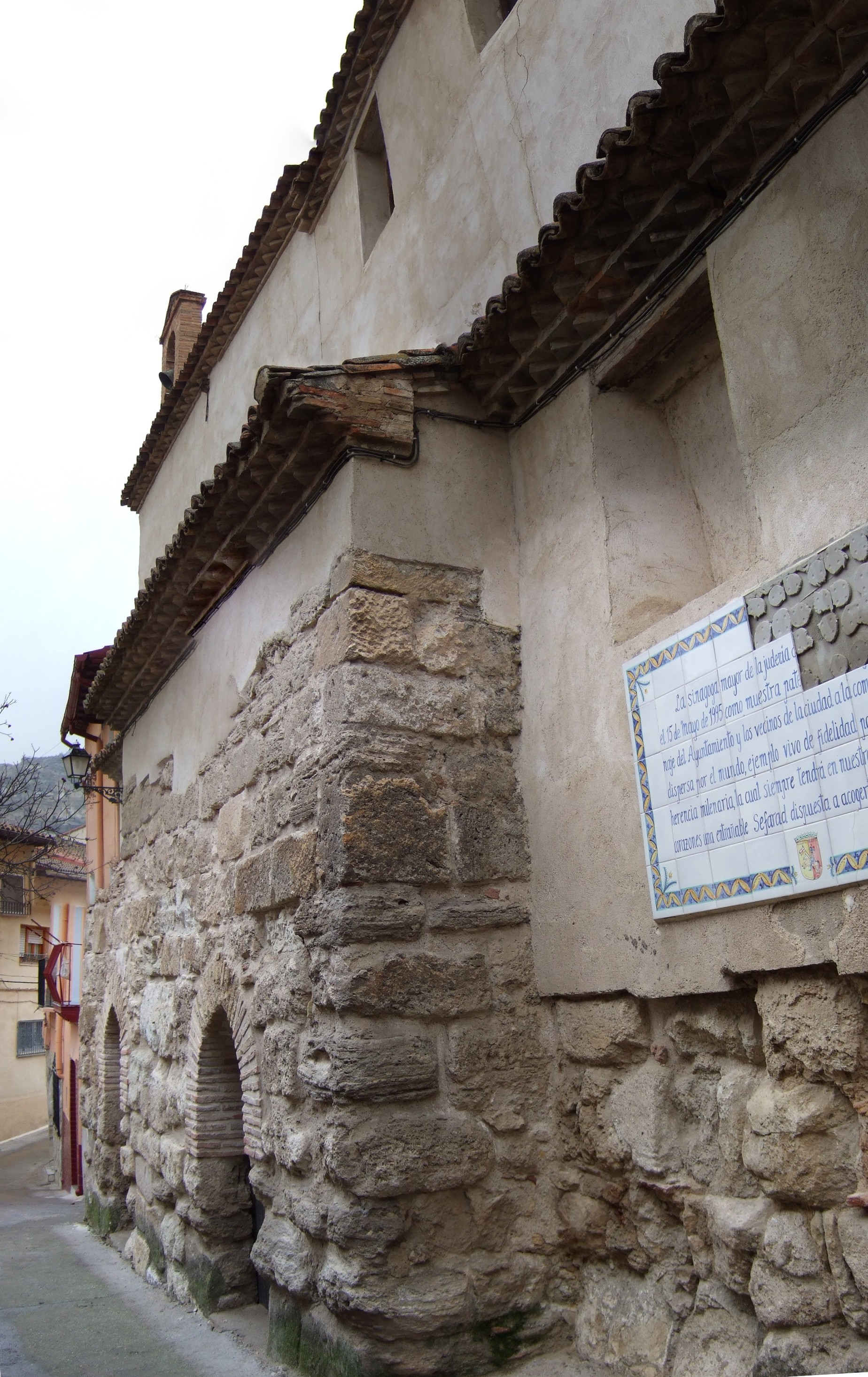 Calatayud - Iglesia de Consolación (reformada en el siglo XVII) - Pared de la sinagoga mayor con entrada separada para hombres y mujeres